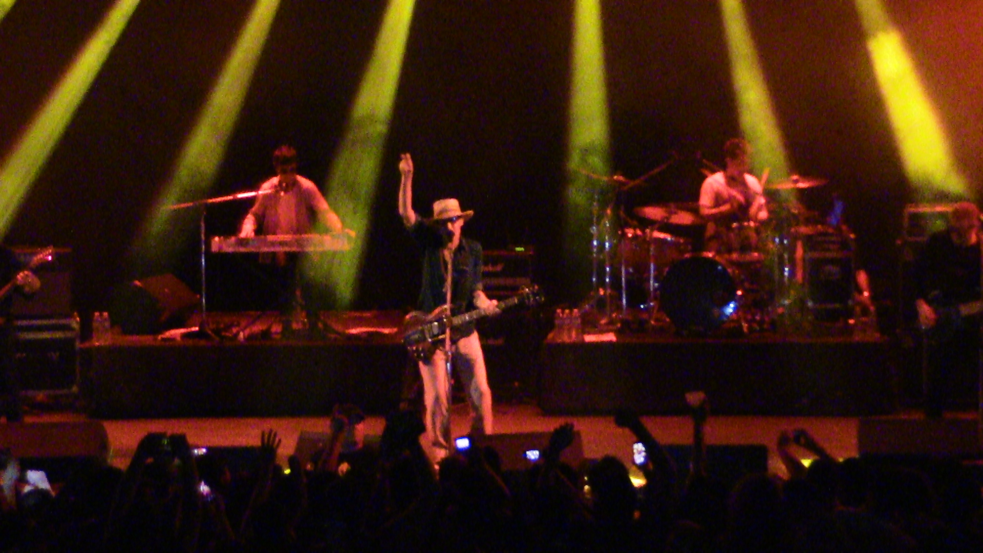 Fotografía de Skay Beilinson y su banda "Los Fakires", durante un show brindado en el Estadio Cubierto del Club de Regatas Corrientes, el 6 de mayo de 2017